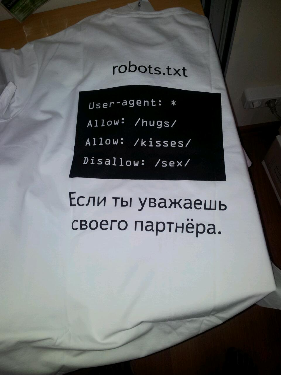 Футболка от "Яндекса"